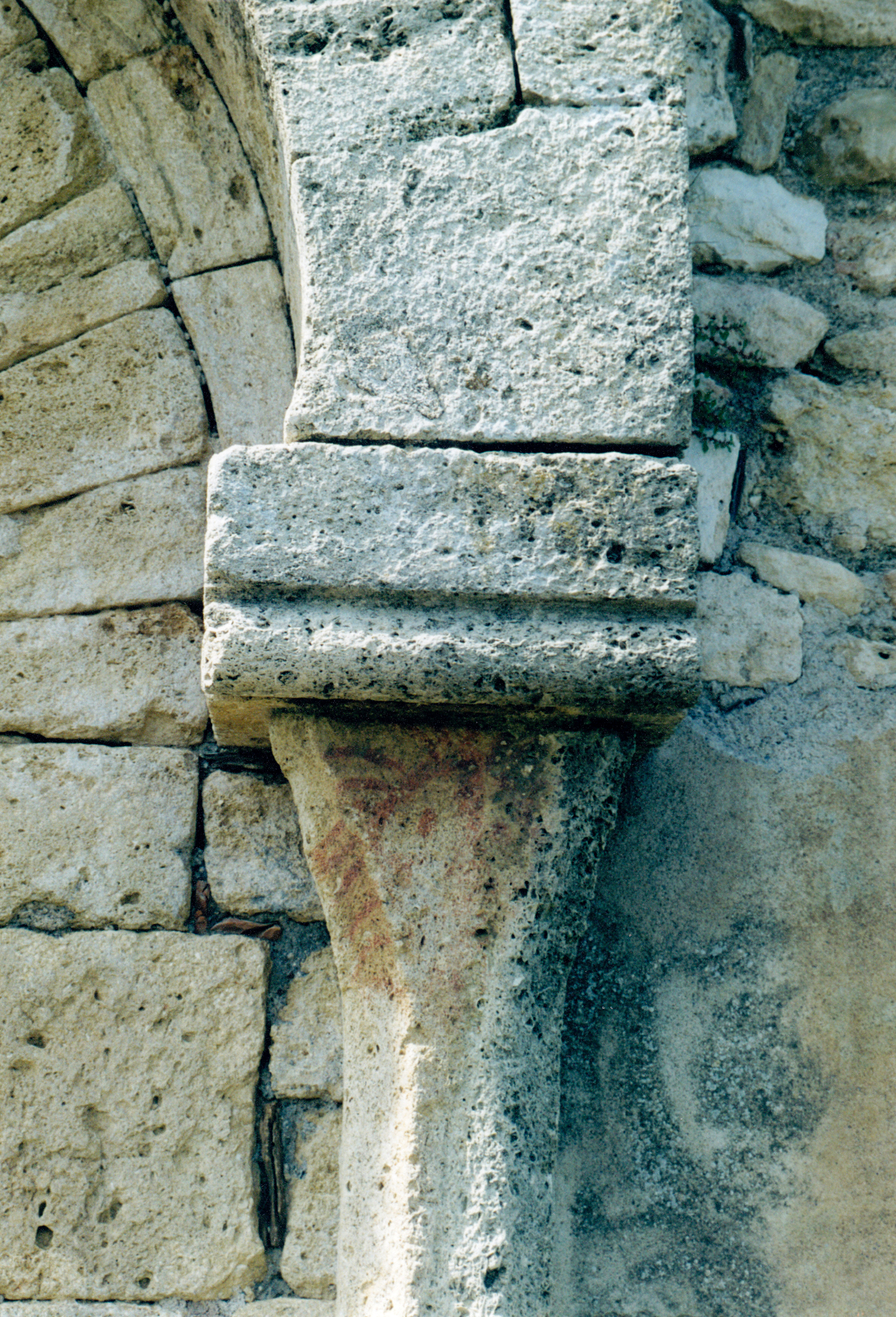 France - Languedoc - Roujan - Saint-Nazaire-de-Roujan (préroman) : chapiteau du portail outrepassé